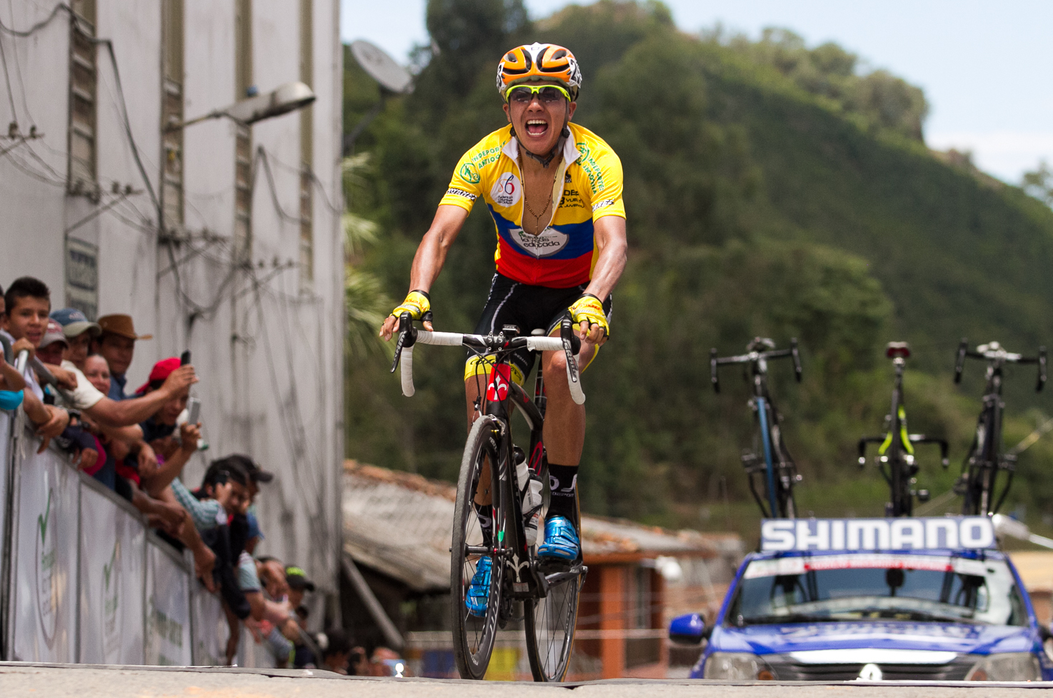 Llegada de la Etapa 4 de la Vuelta de la Juventud 2015.